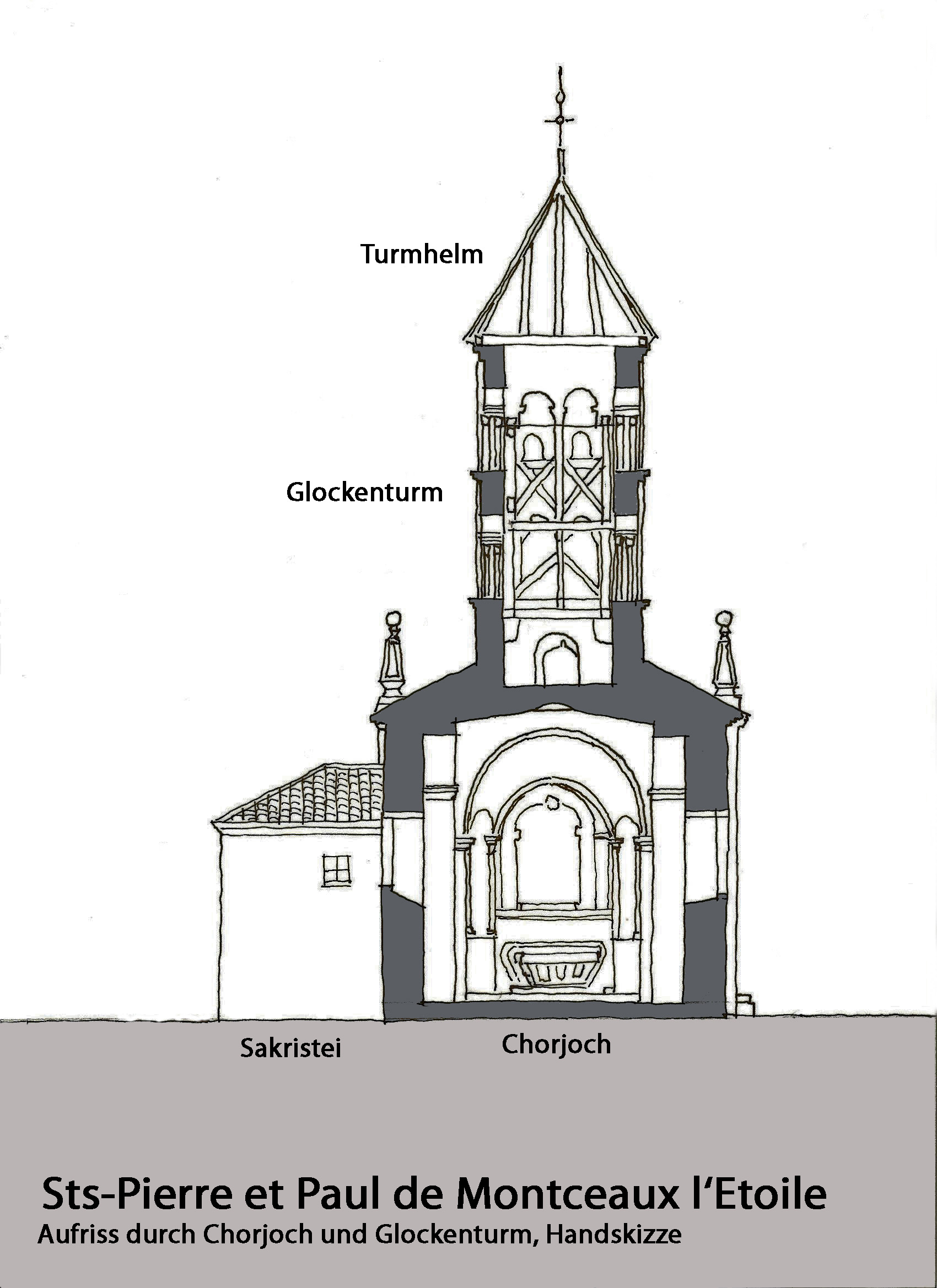 Montceaux l'Étoile, Aufriss